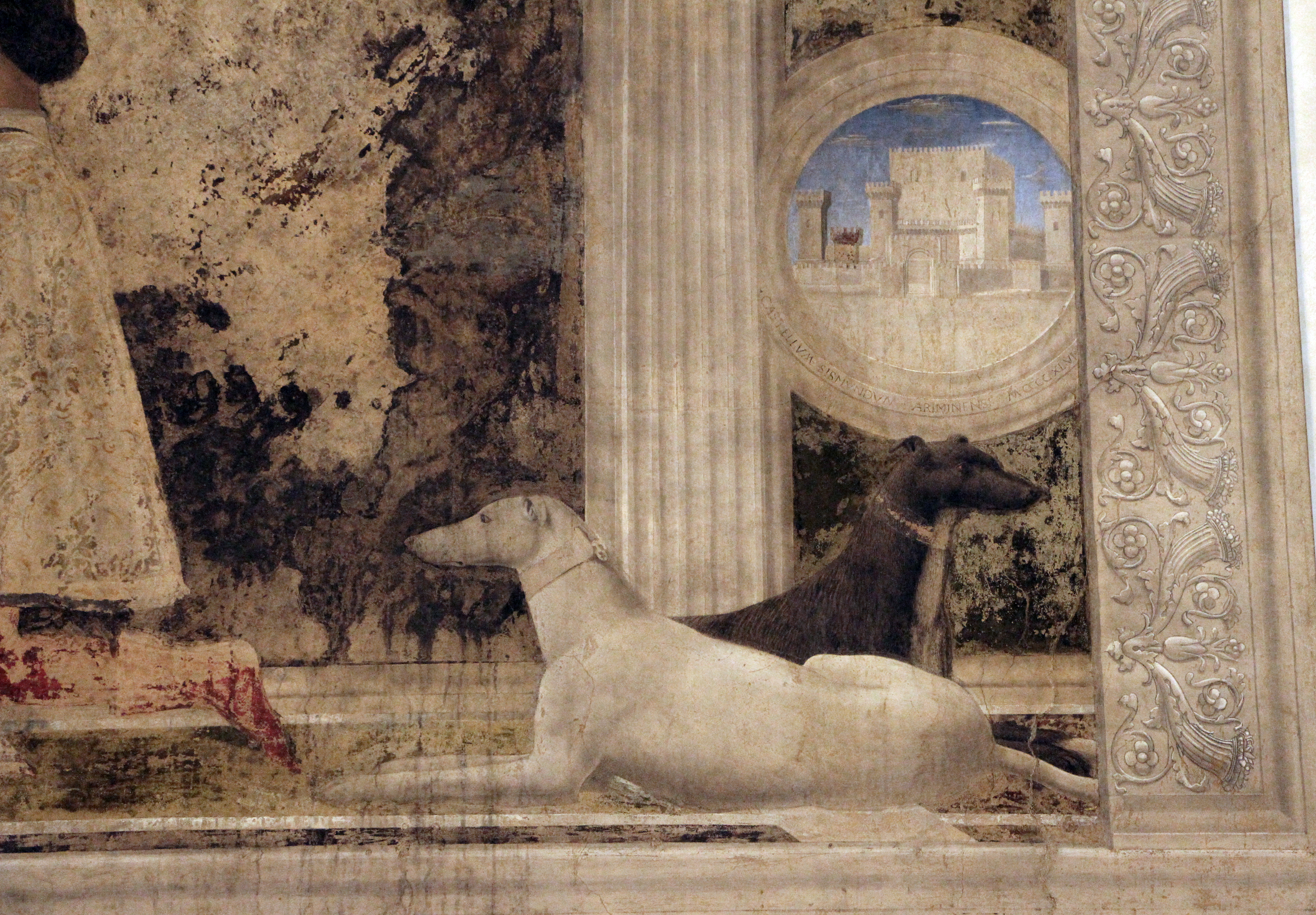 Tempio Malatestiano - MIBAC The making of this document was supported by Wikimedia CH. (Submit your project!) For all the files concerned, please see the category Supported by Wikimedia CH. This is a photo of a monument which is part of cultural heritage of Italy.